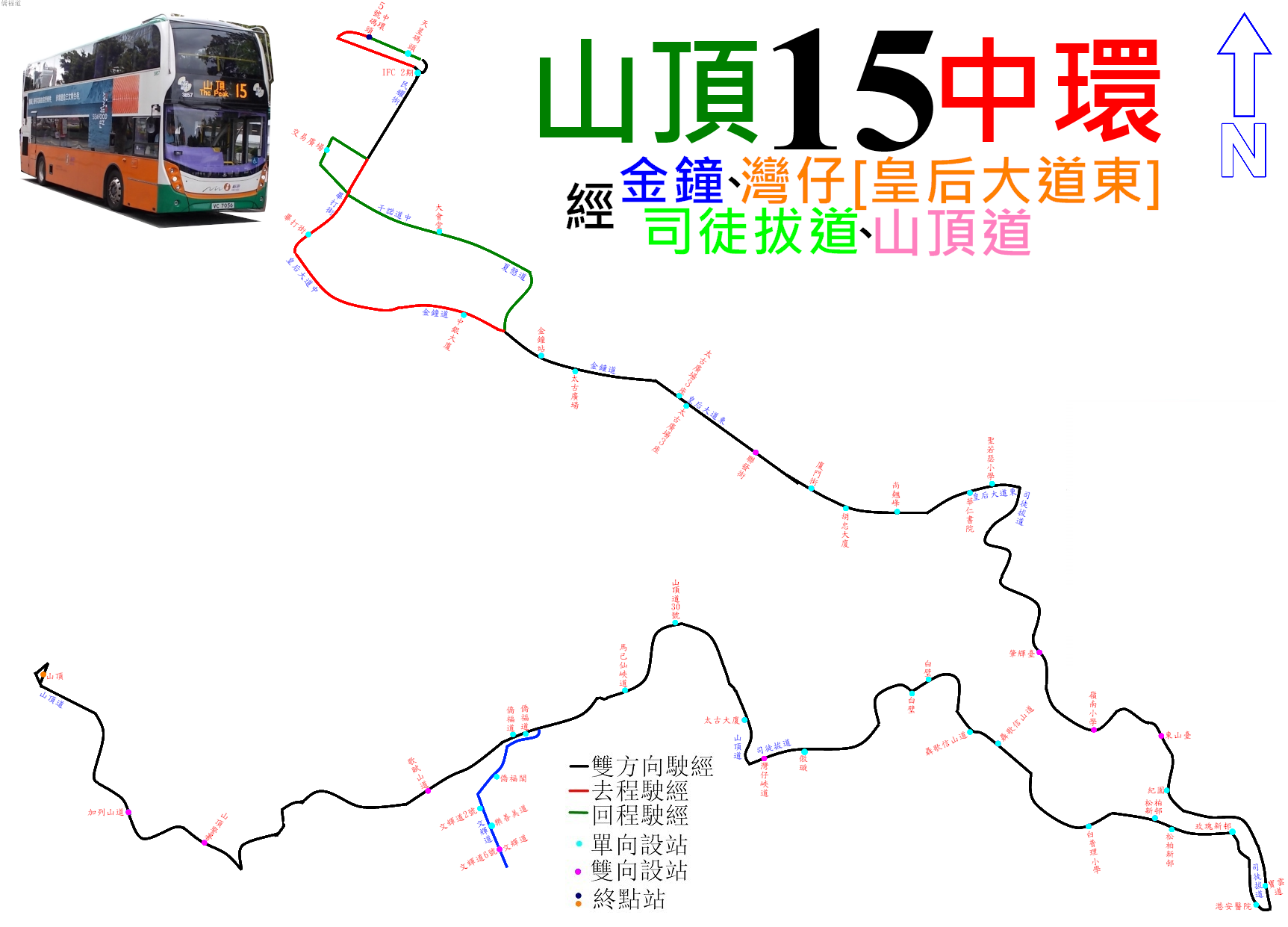 中文（香港）: 新巴15線的走線圖